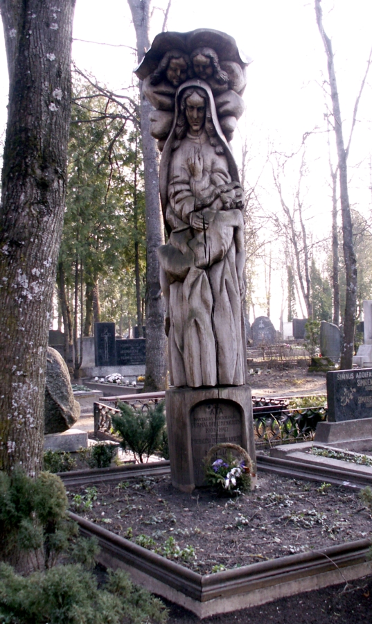 Prano Dielininkaičio kapas